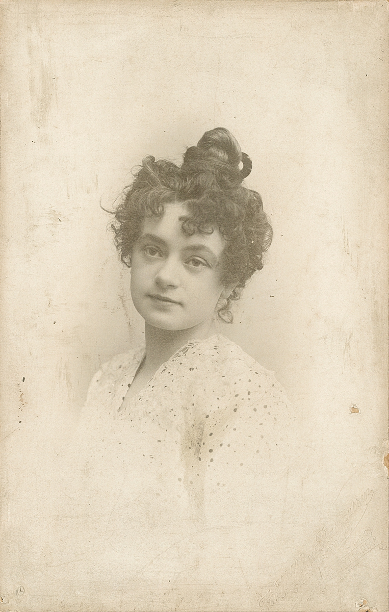 Gyda Christensen, portrett, kvinne, skuespillerinne, vignettert brystbilde.